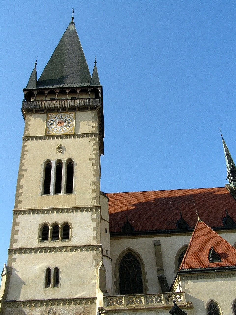 Bazilika sv. Egídia, veža This medium shows the protected monument with the number 701-1679/0 in the Slovak Republic.